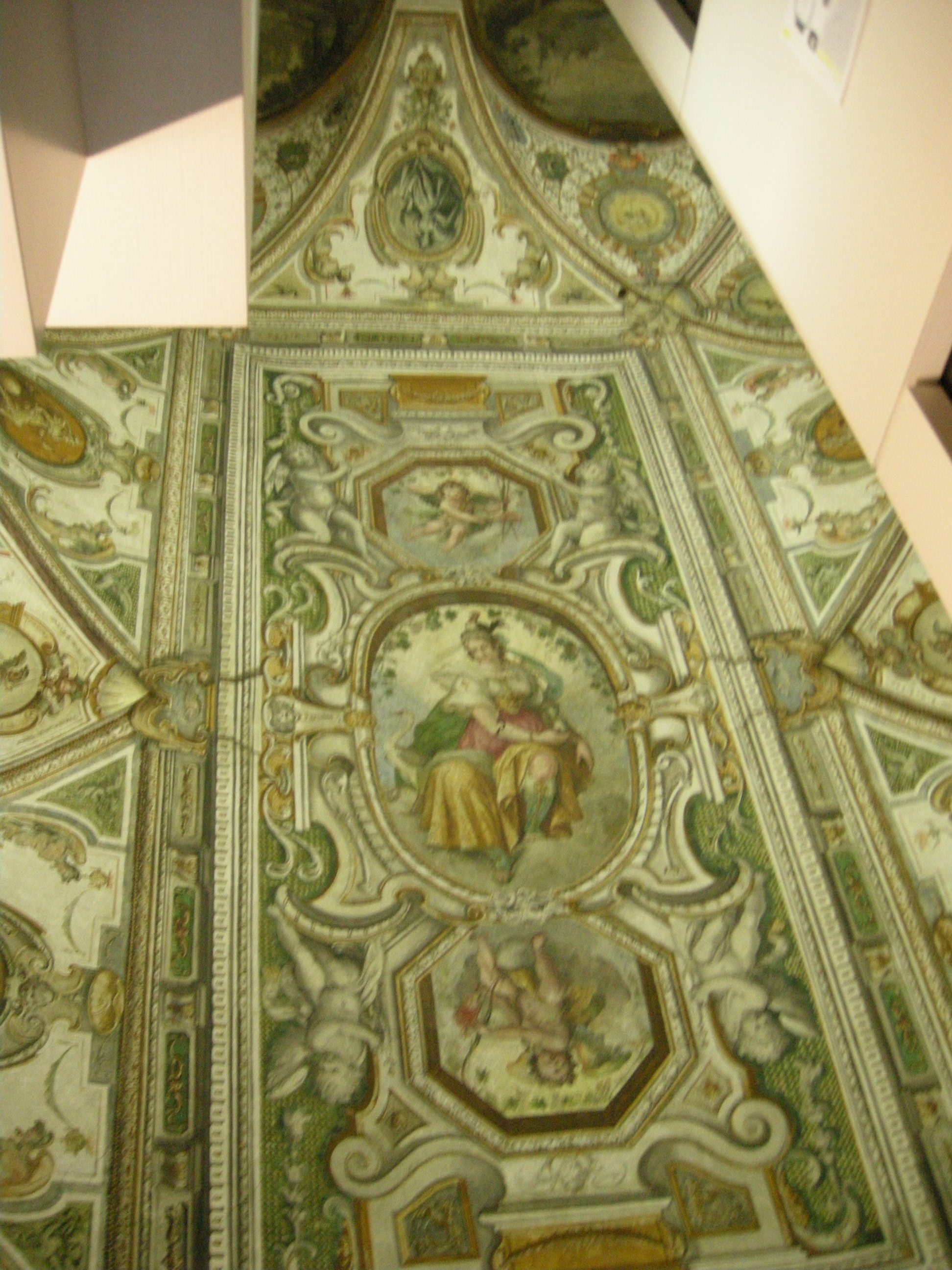 Palazzo tolomei biffi, saletta grottesche